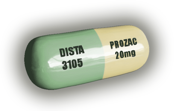 Распространенная торговая форма флуоксетина. Твёрдая капсула бледно-желтого и болотного цвета. Содержание капсулы эквивалентно 20мг флуоксетина.